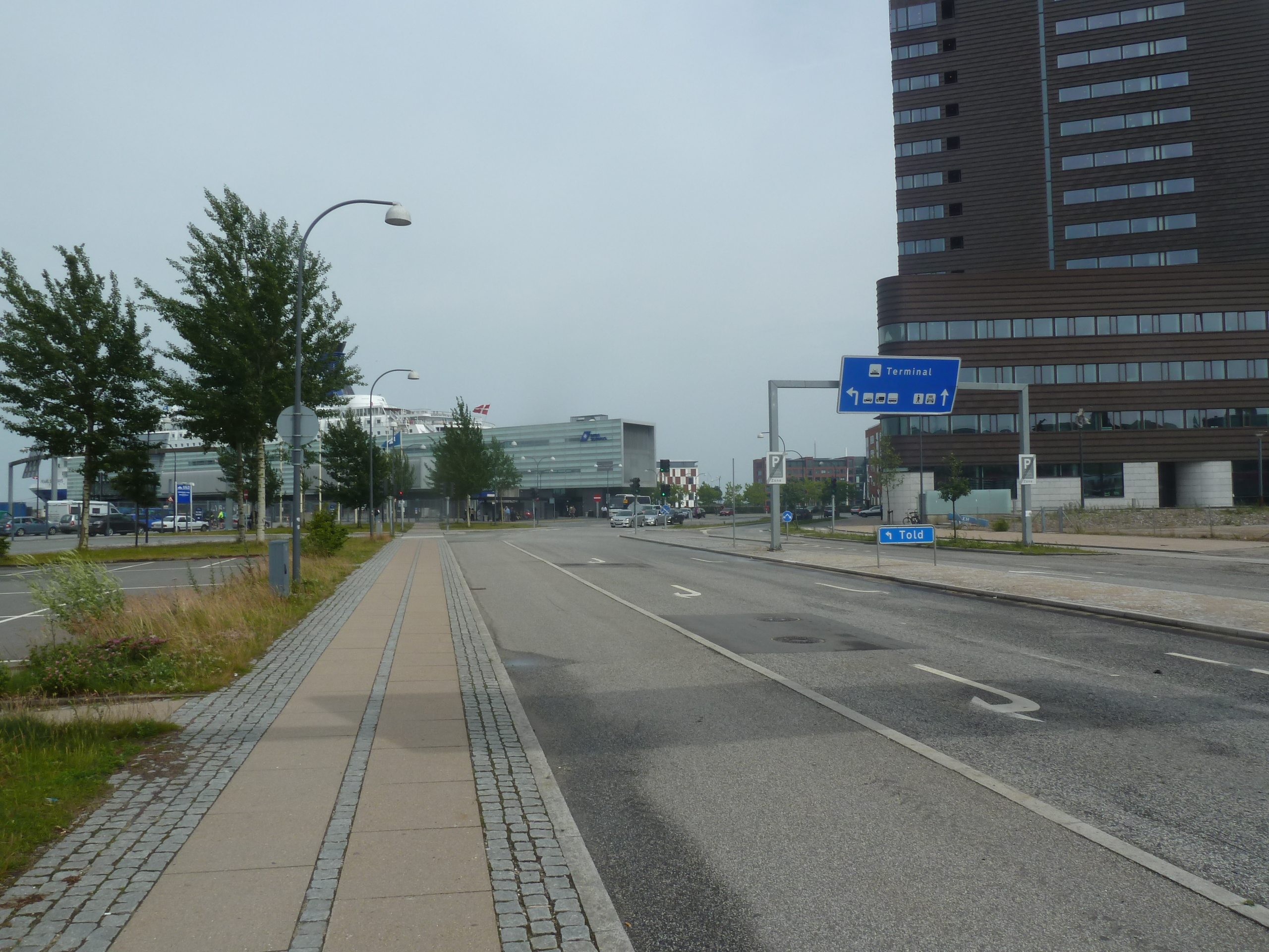 The street Dampfærgevej in Østerbro in Copenhagen.